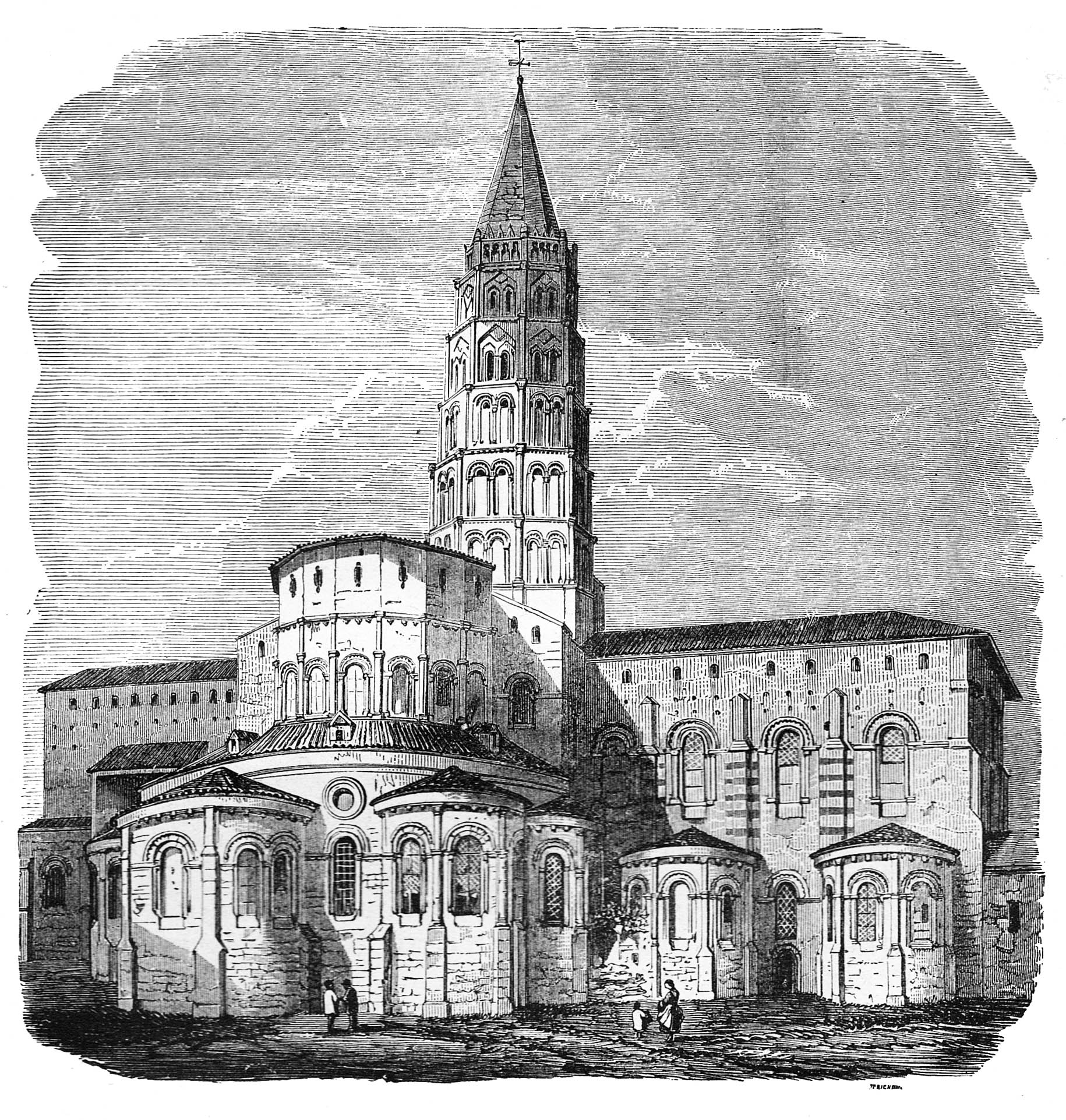 Basilique Saint-Sernin de Toulouse (France), avant 1860. Gravure par Auguste Trichon in "Le Midi pittoresque" d'Eugène Trutat, Limoges, Marc Barbou, 1894